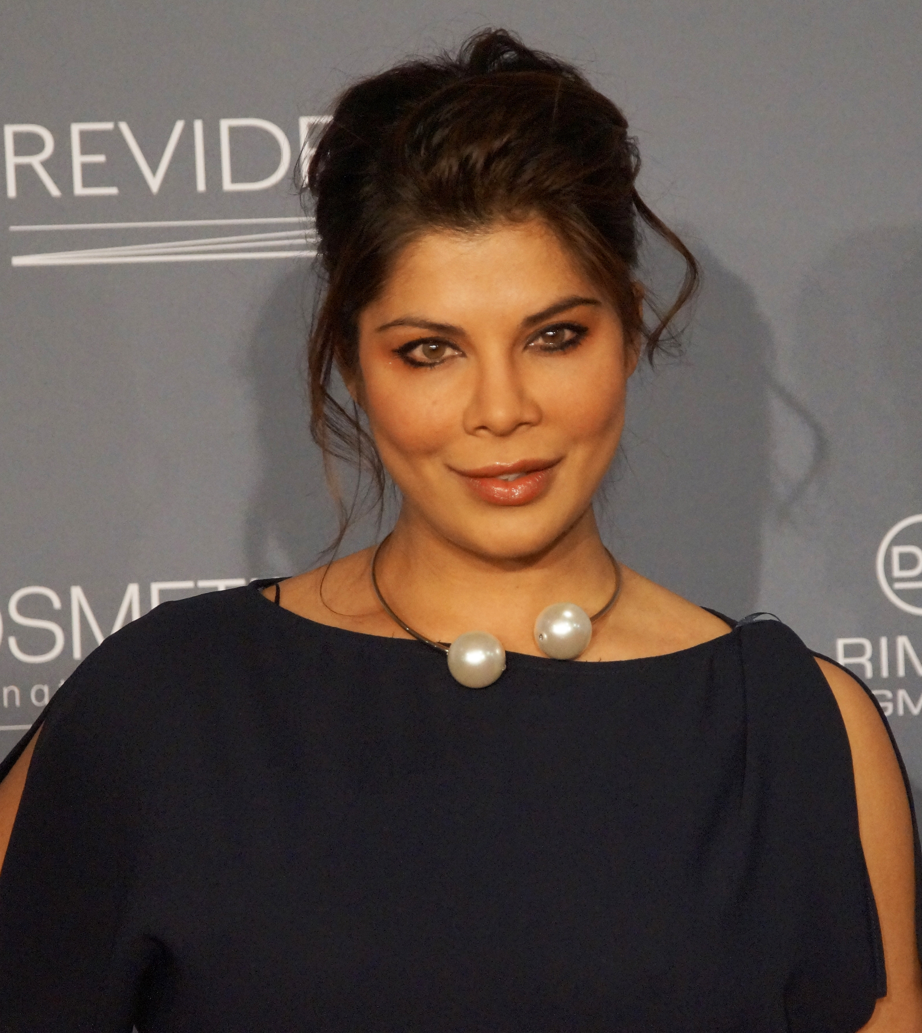 Indira Weis beim "Gloria – Deutscher Kosmetikpreis" am 04. März 2016 im Hilton Hotel Düsseldorf.